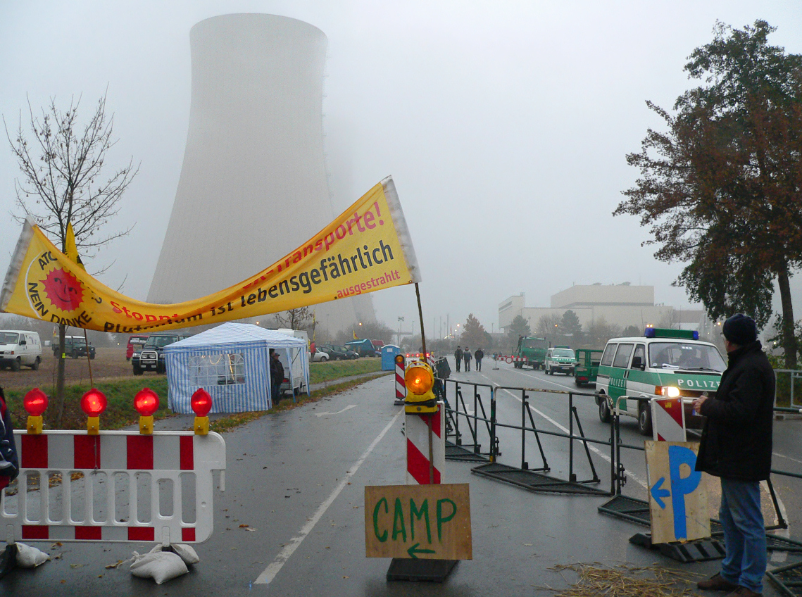 Plakate vor dem KKW Grohnde gegen MOX-Transport